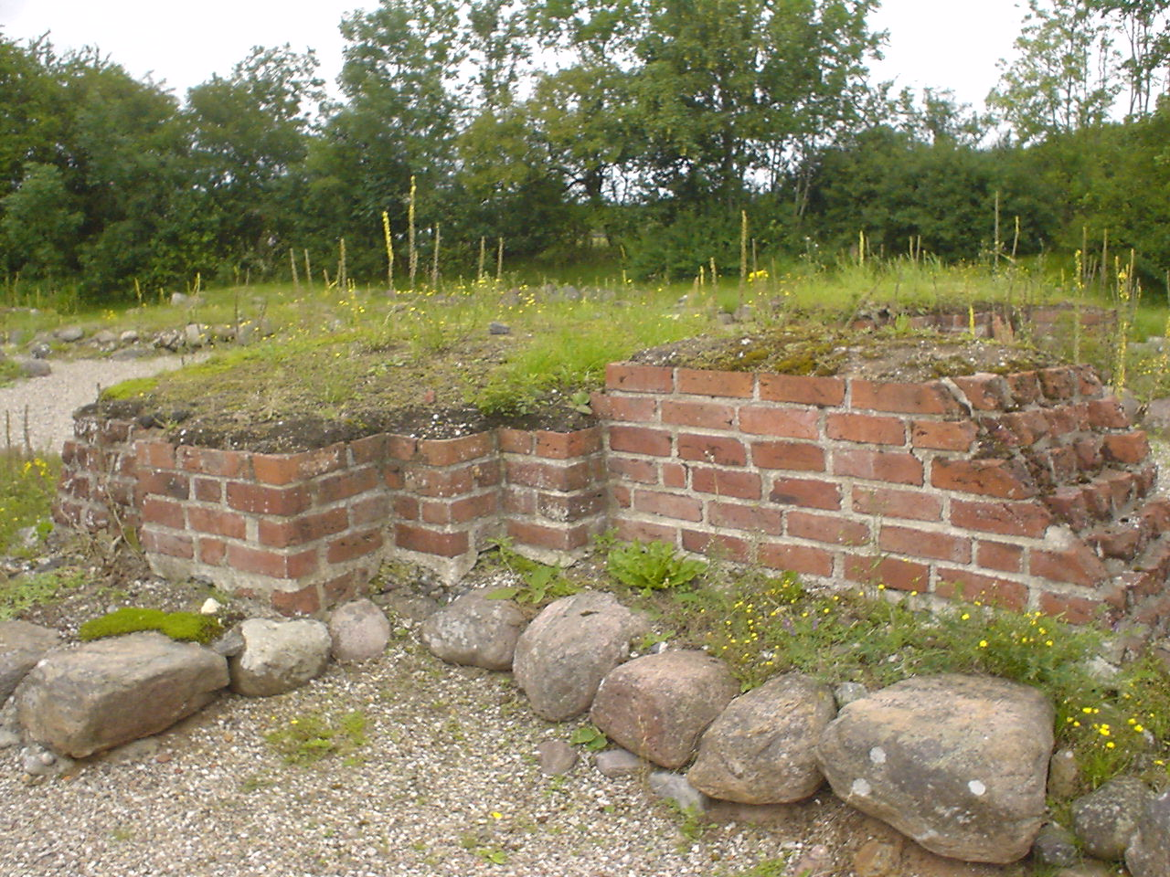 Kloster Oem, Jütland, Mauerreste im nördl. Seitenschiff